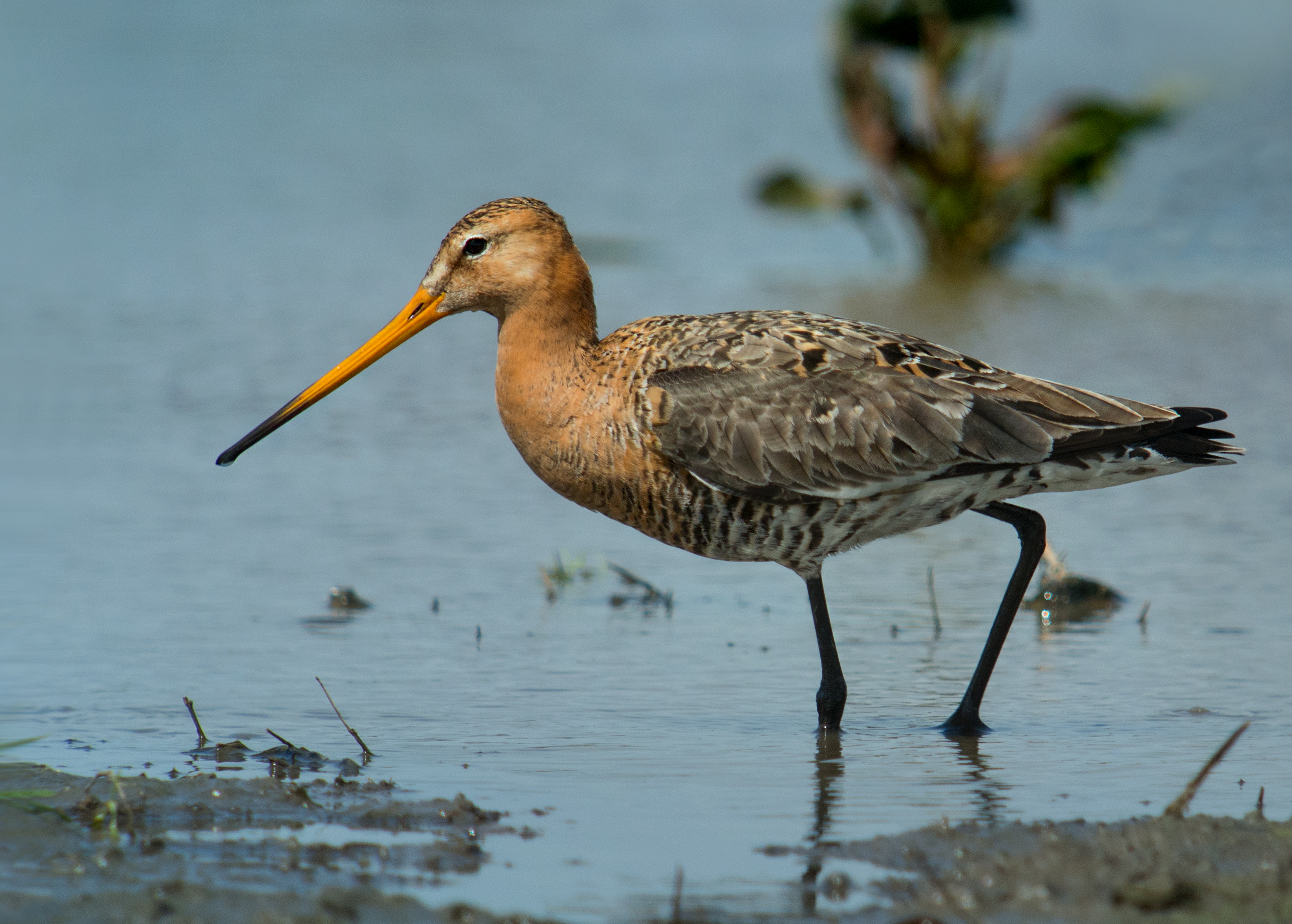 Digiscoping with Swarovski ATM 80 HD 30 X, Nikon 1V1 + 11-27,5 mm lens (Adapter DCB)